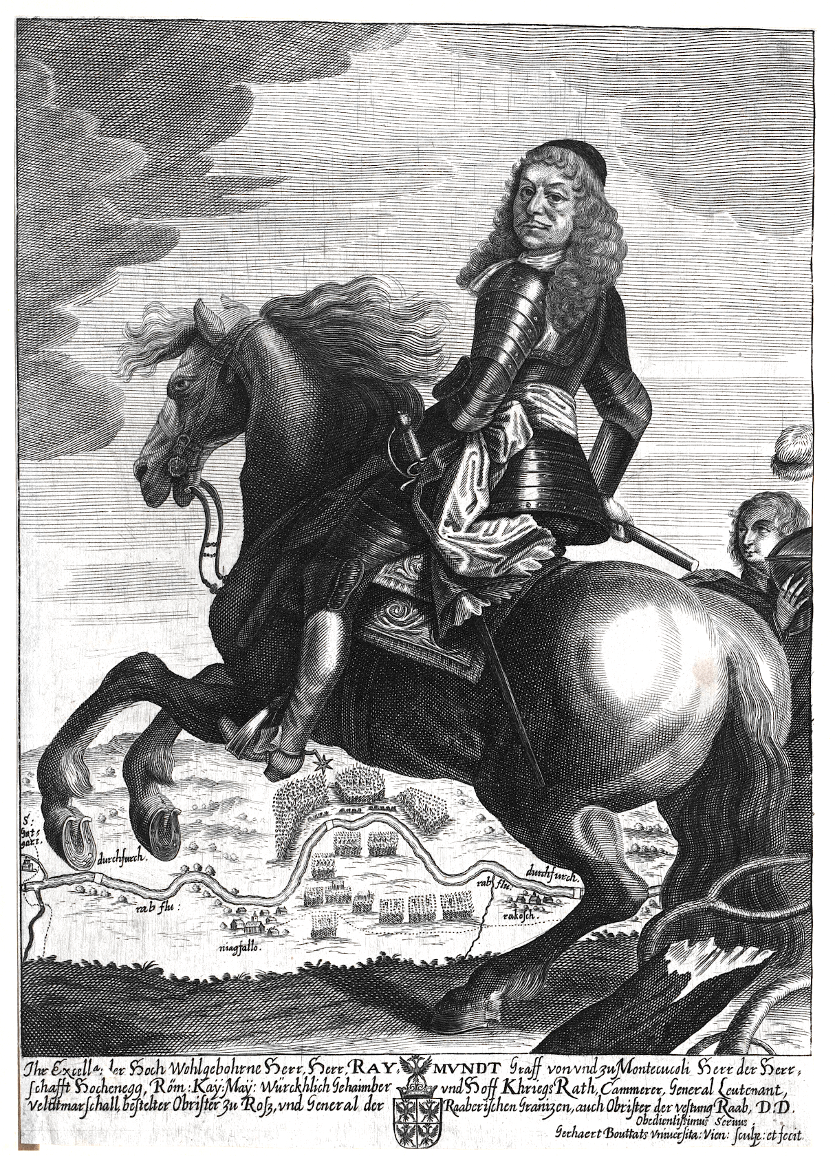 Montecuccoli, Raimund Graf